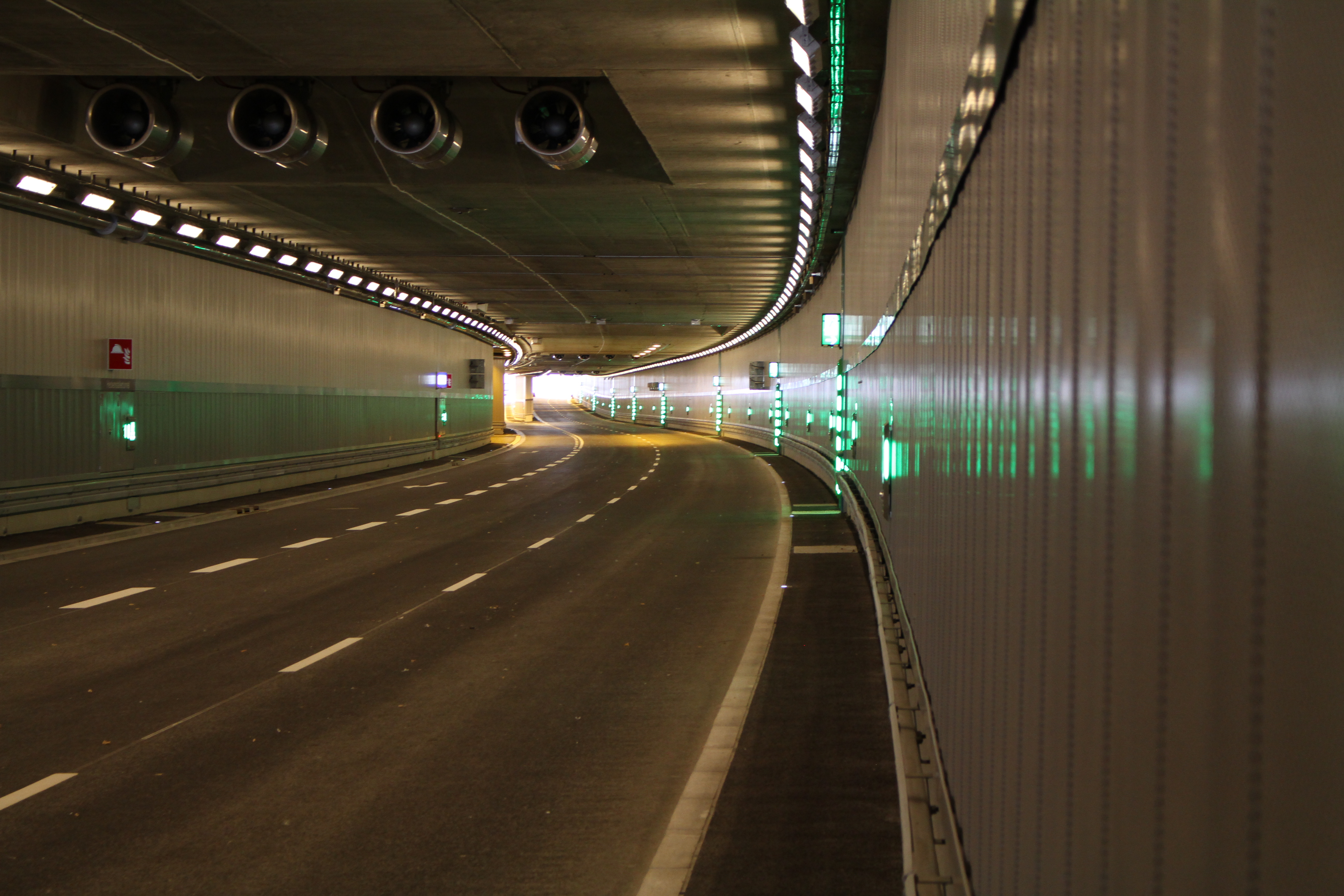 Heckenstaller-Tunnel des Mittleren Rings